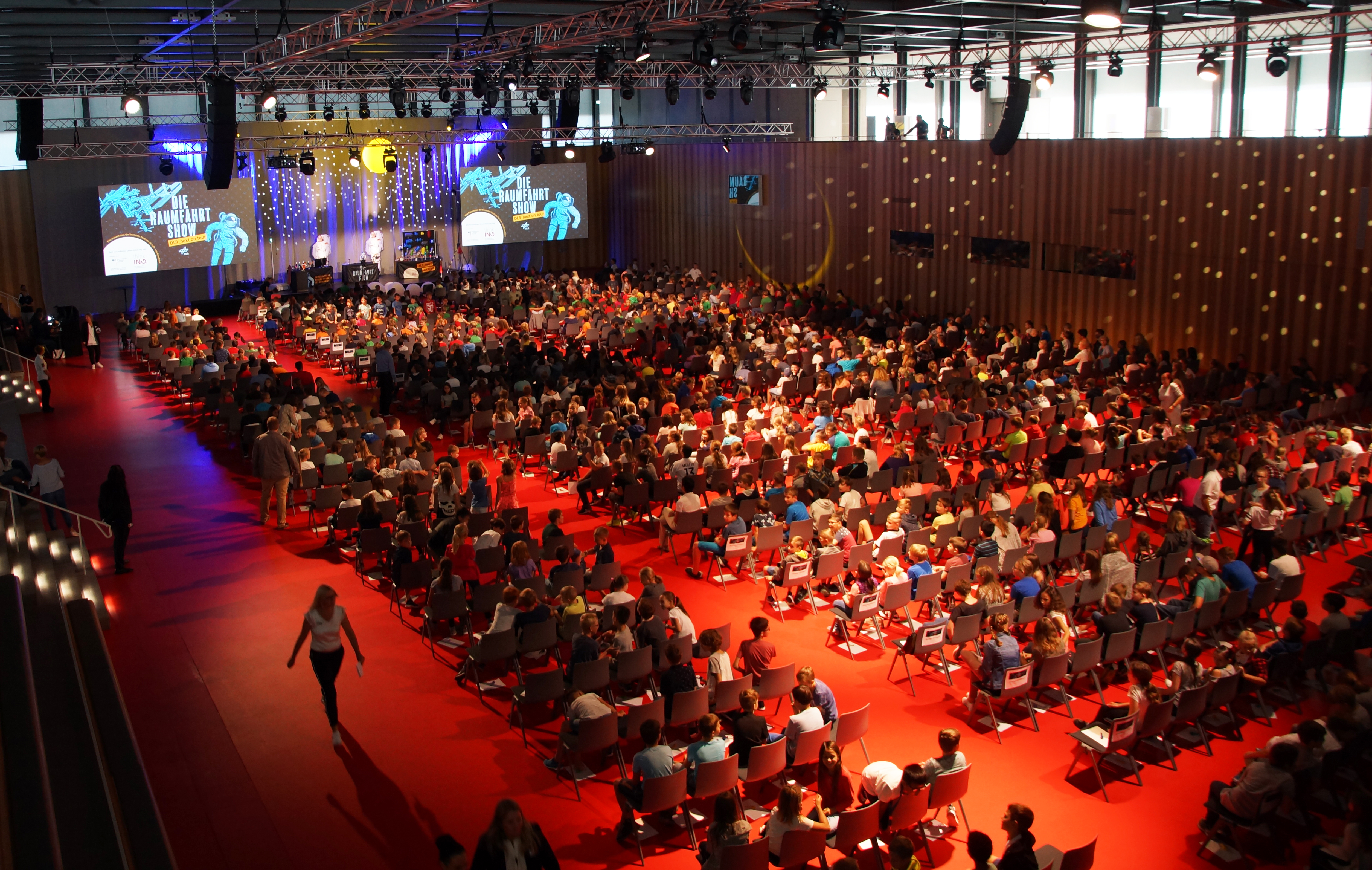 Raumfahrt-Show der DLR zur Horizons-Mission des deutschen ESA-Astronauten Alexander Gerst in Künzelsau am 17. September 2018.